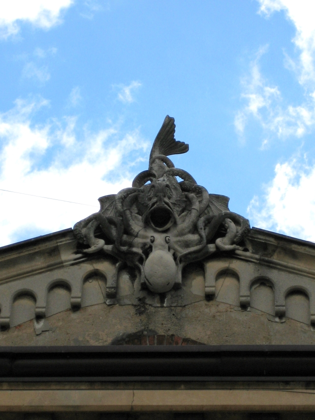 detalj na ribarnici u Rijeci